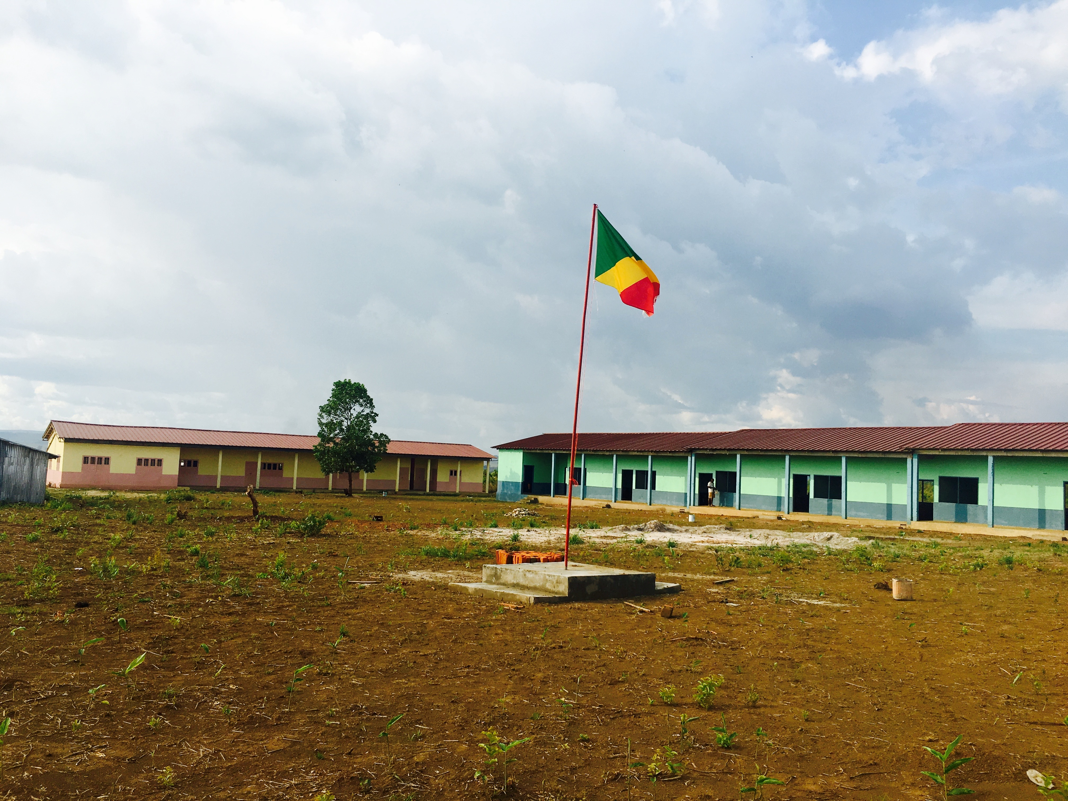 ecole